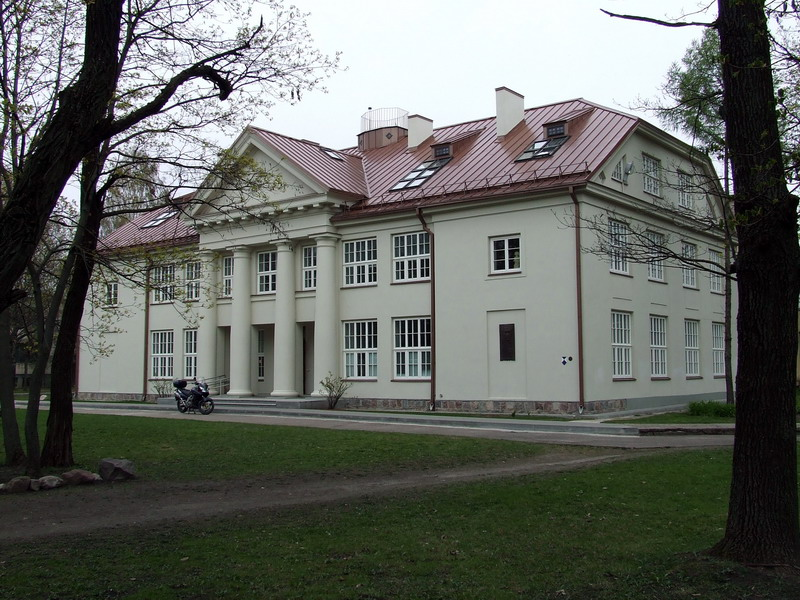 Kauno meno mokykla.